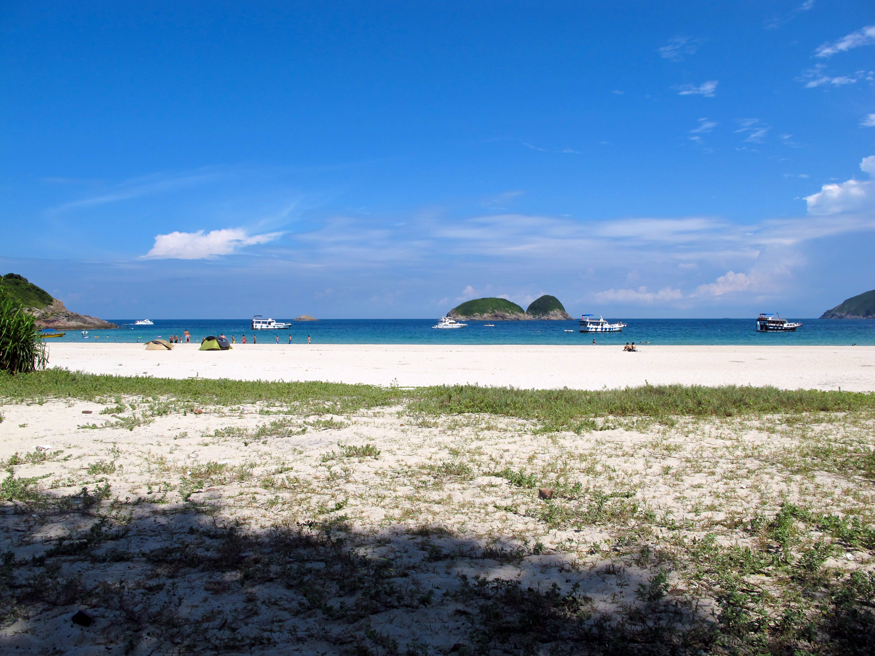 Ham Tin Beach